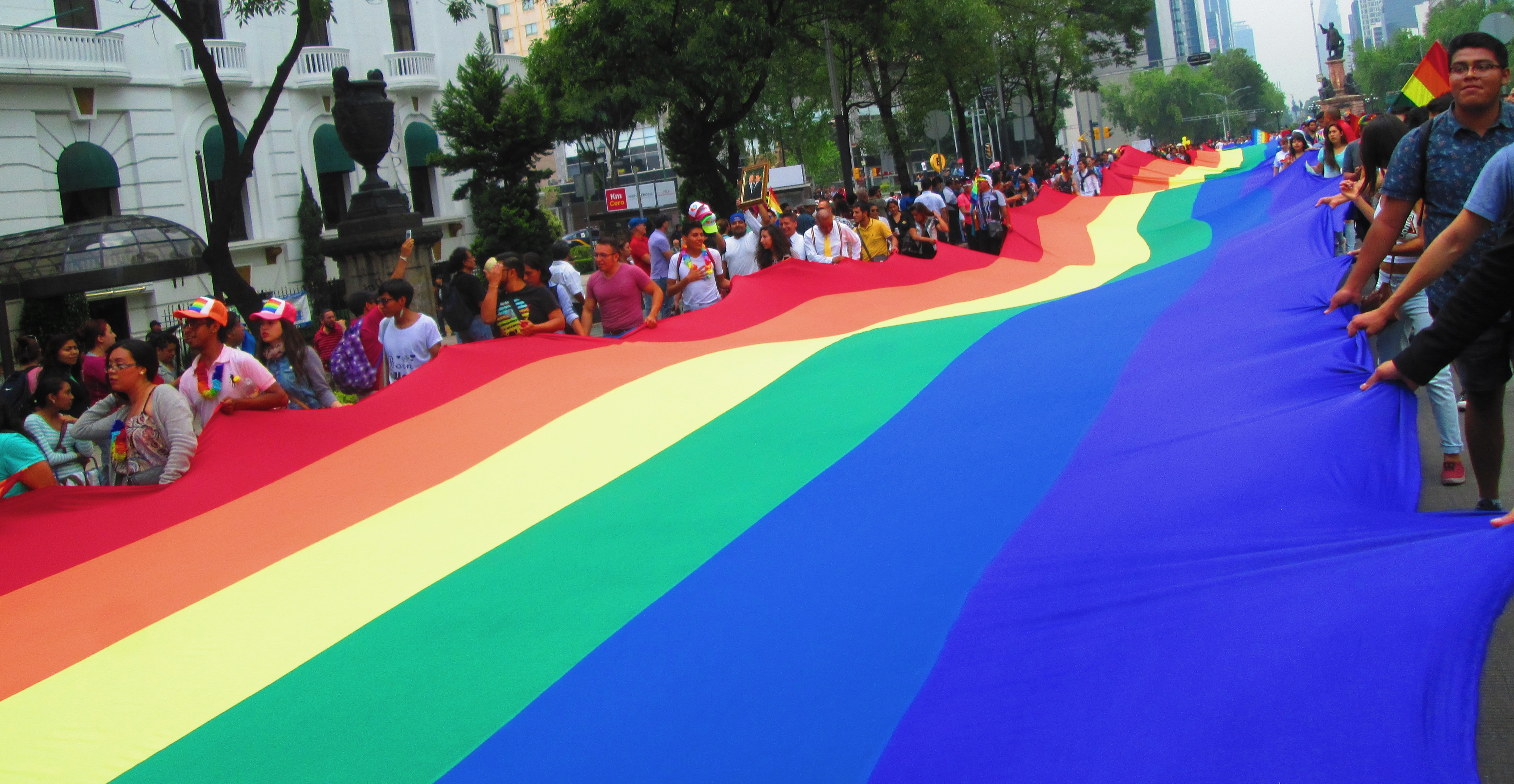 Bandera monumental Marcha LGBTTTI 2016 de 400 metros, la extensión aproximada estaba del Ángel de la independencia a la palma